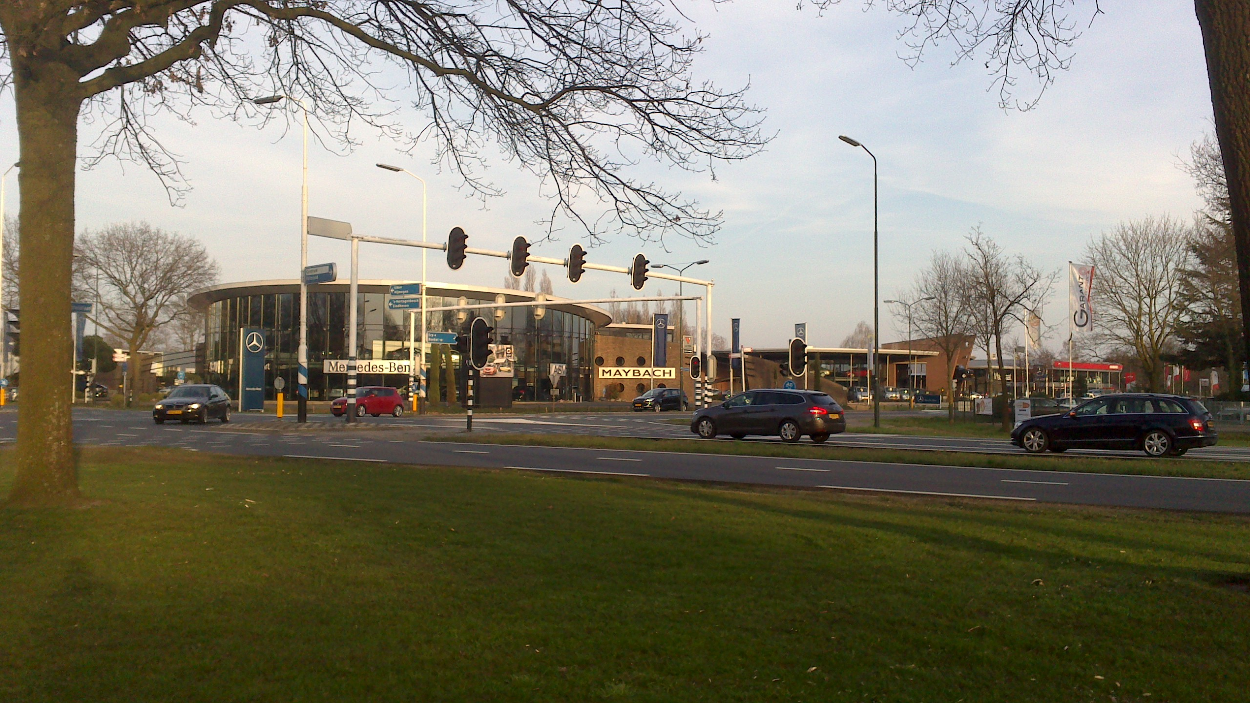 Bedrijvenlocatie Themapark Garages, Heuvelplein, Veghel. ASV Mercedes-Benz, AMG, Maybach.